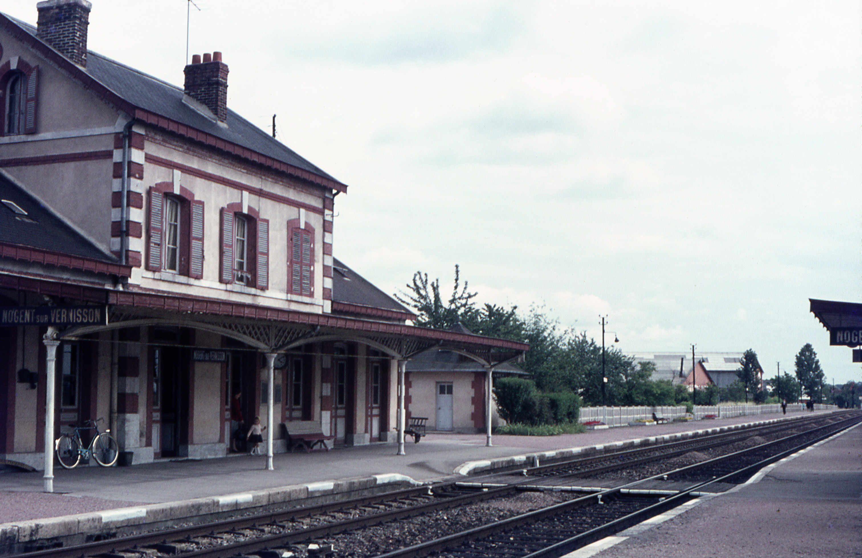 Gare de Nogent-sur-Vernisson en 1966, sur la ligne Montargis - Clermont-Ferrand non électrifiée à l'époque, Nogent-sur-Vernisson, Loiret, France